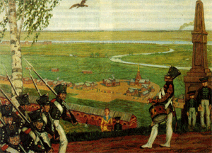 М.В. Добужинский. Военные поселения [Александровской эпохи]